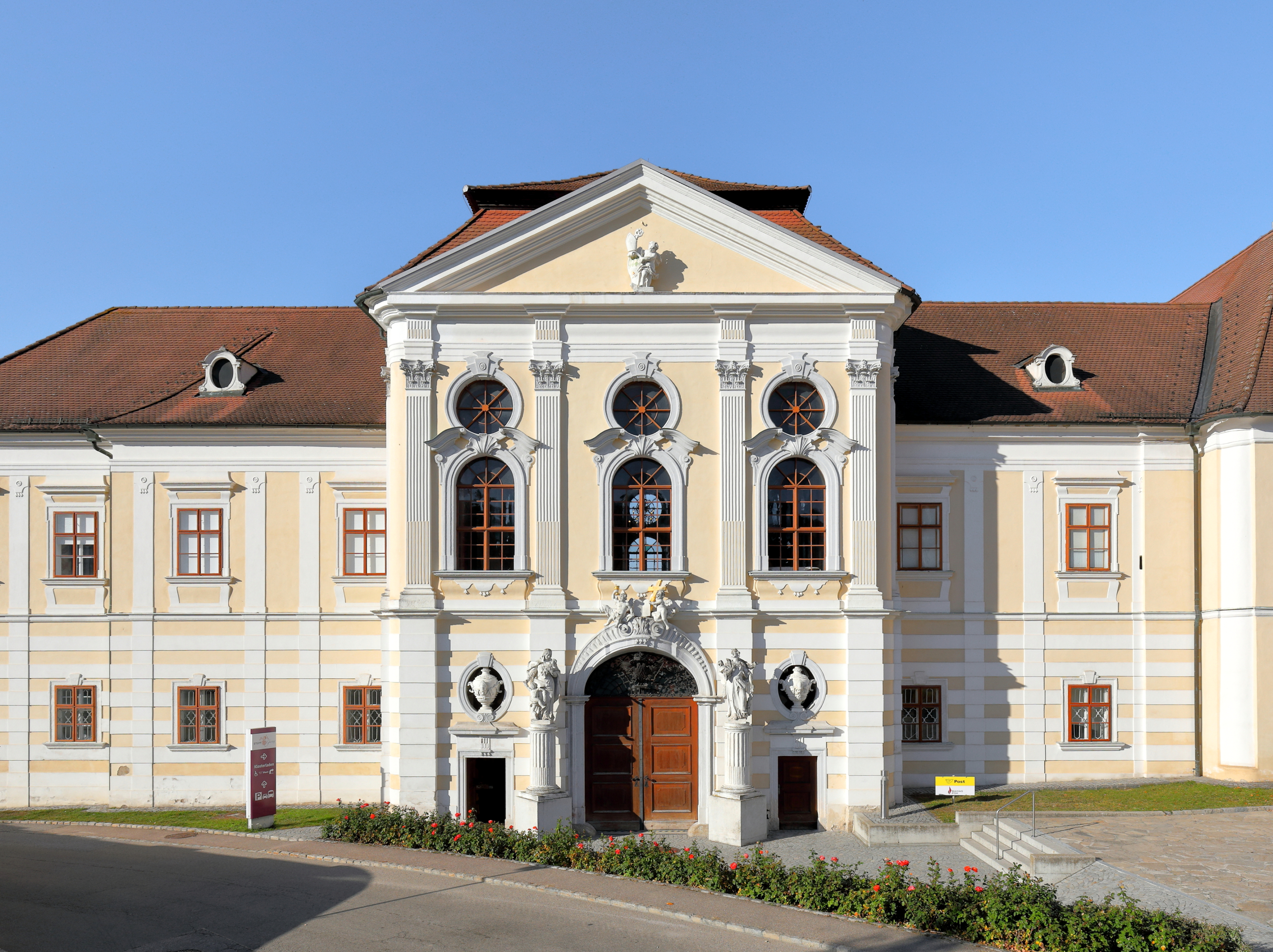 Das „Neugebäude“ des Prämonstratenser-Chorherrenstiftes in der niederösterreichischen Stadt Geras. Ein barocker Bau mit einer dem Ort zugewandten Hauptfassade und einem überhöhten Torpavillon mit Einfahrt. Er wurde von 1736 bis 1740 nach Plänen und unter Aufsicht von Joseph Munggenast errichtet.